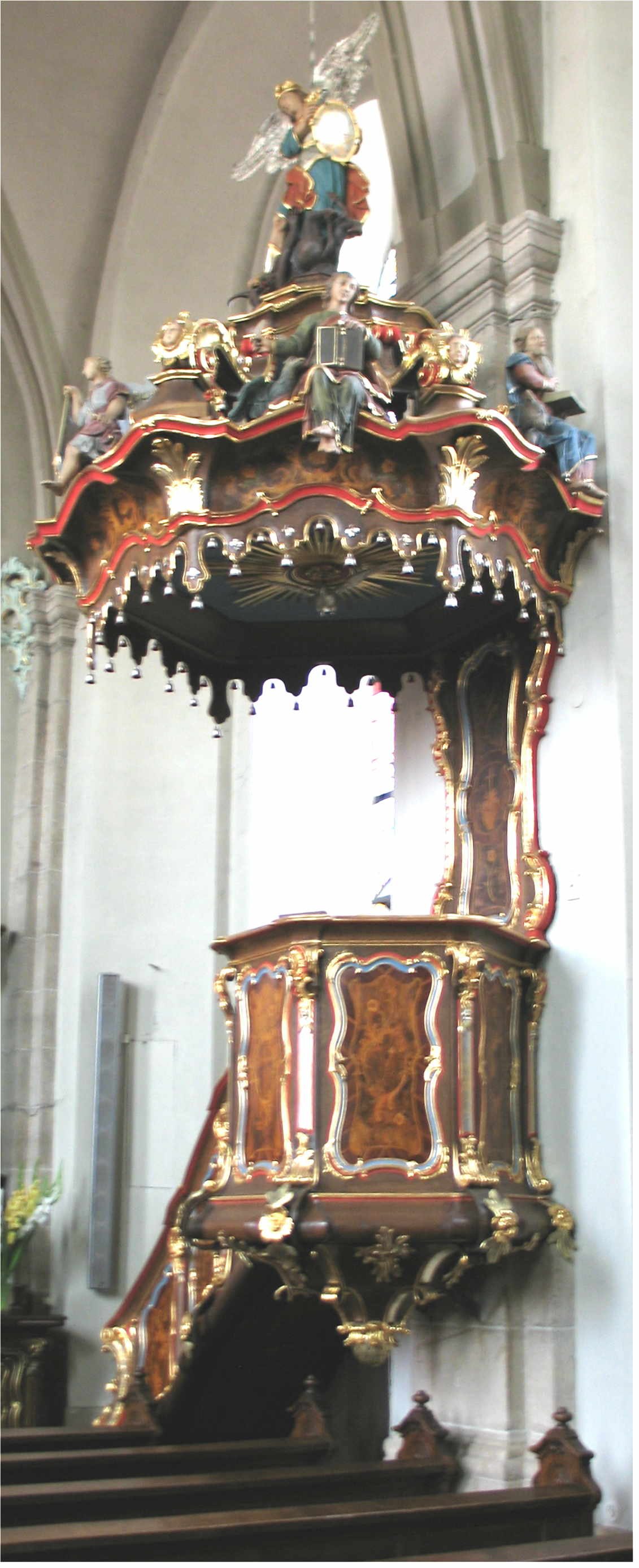 Priedegtstull an der Kierch zu Munneref.